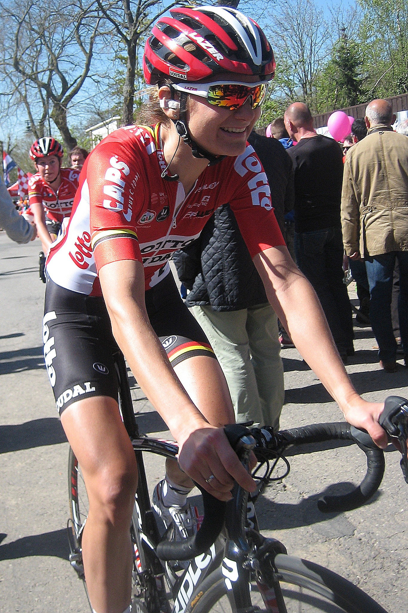 Claudia Lichtenberg (Lotto Soudal Ladies) na finish Waalse Pijl 2016